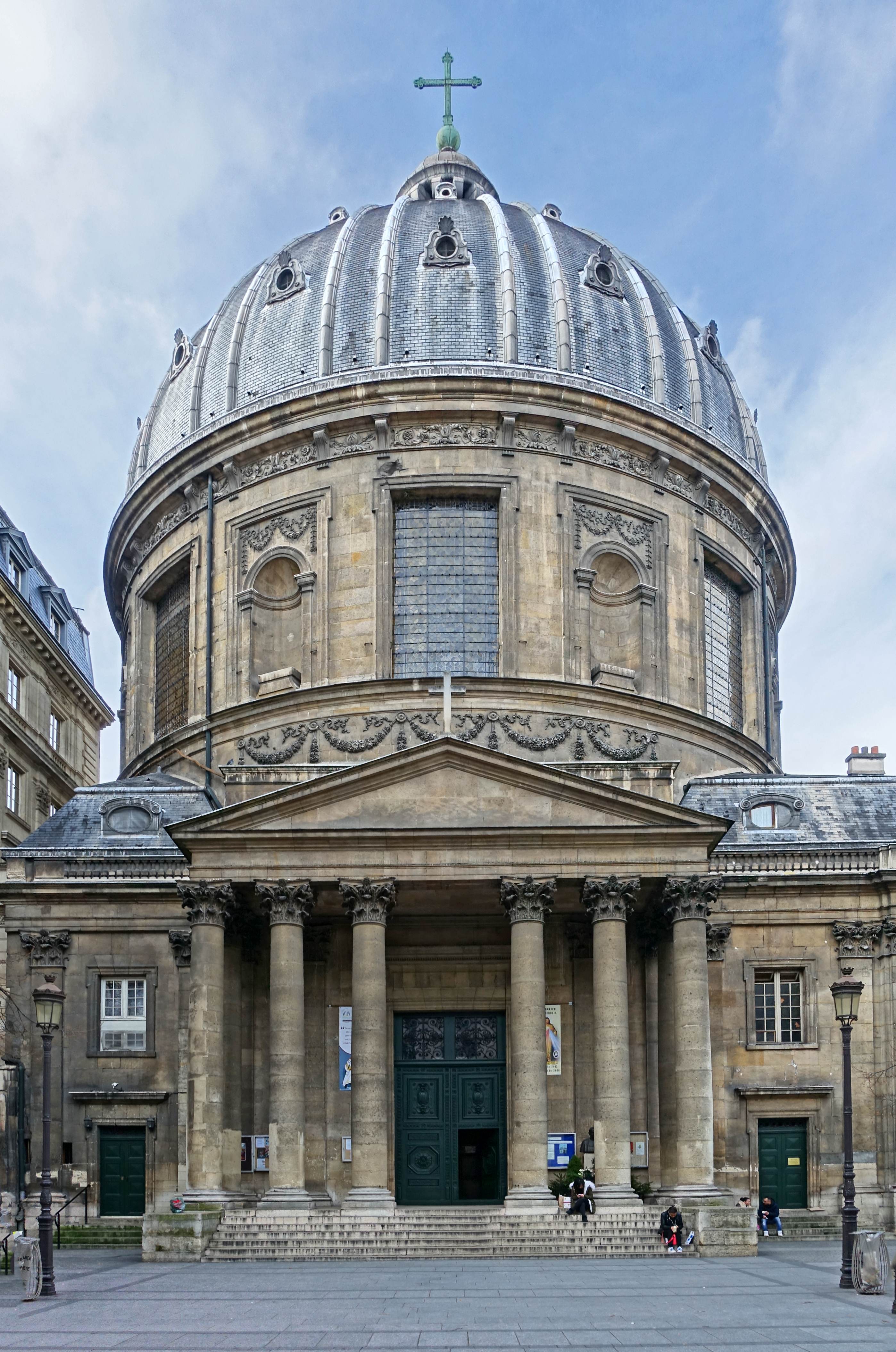 Eglise Notre-Dame-de-l'Assomption @ Rue Saint-Honoré @ Paris